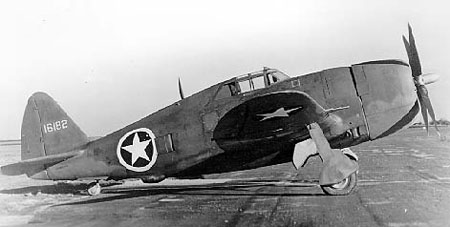 Republic P-47C-2-RE